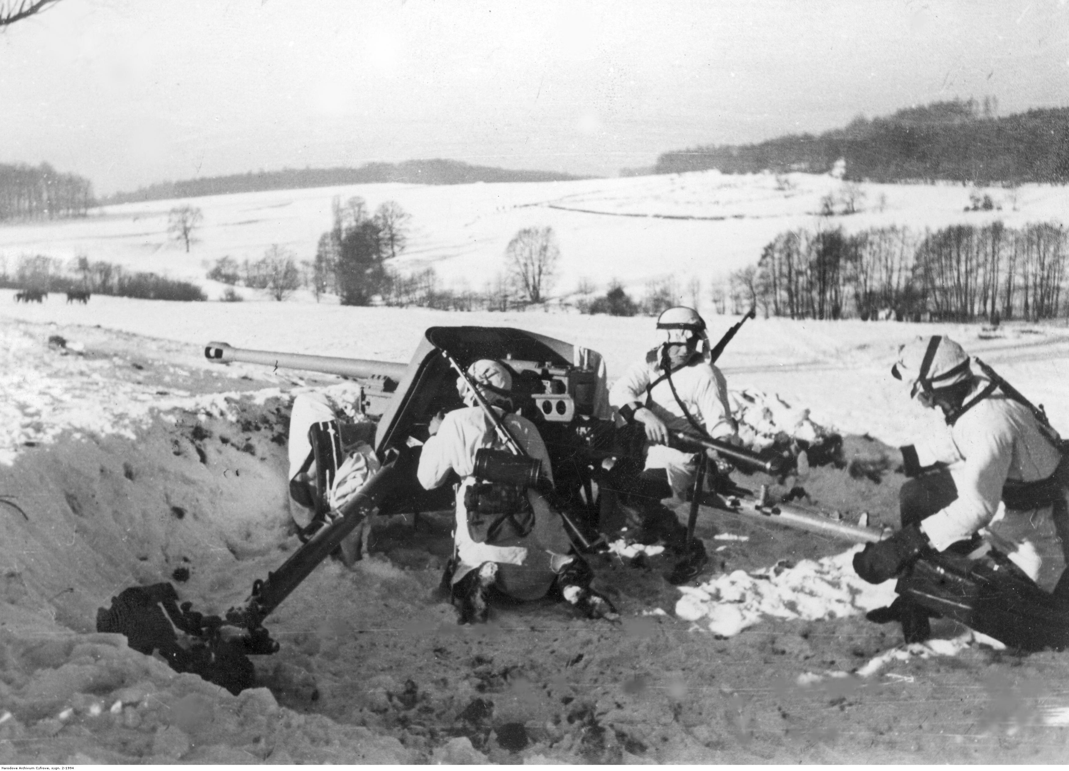 Stanowisko armaty przeciwpancernej Pak 38 kal. 50 mm na froncie wschodnim . Widoczni żołnierze 14. Dywizji Grenadierów Waffen SS "Galizien". Fotografia wykonana zimą.